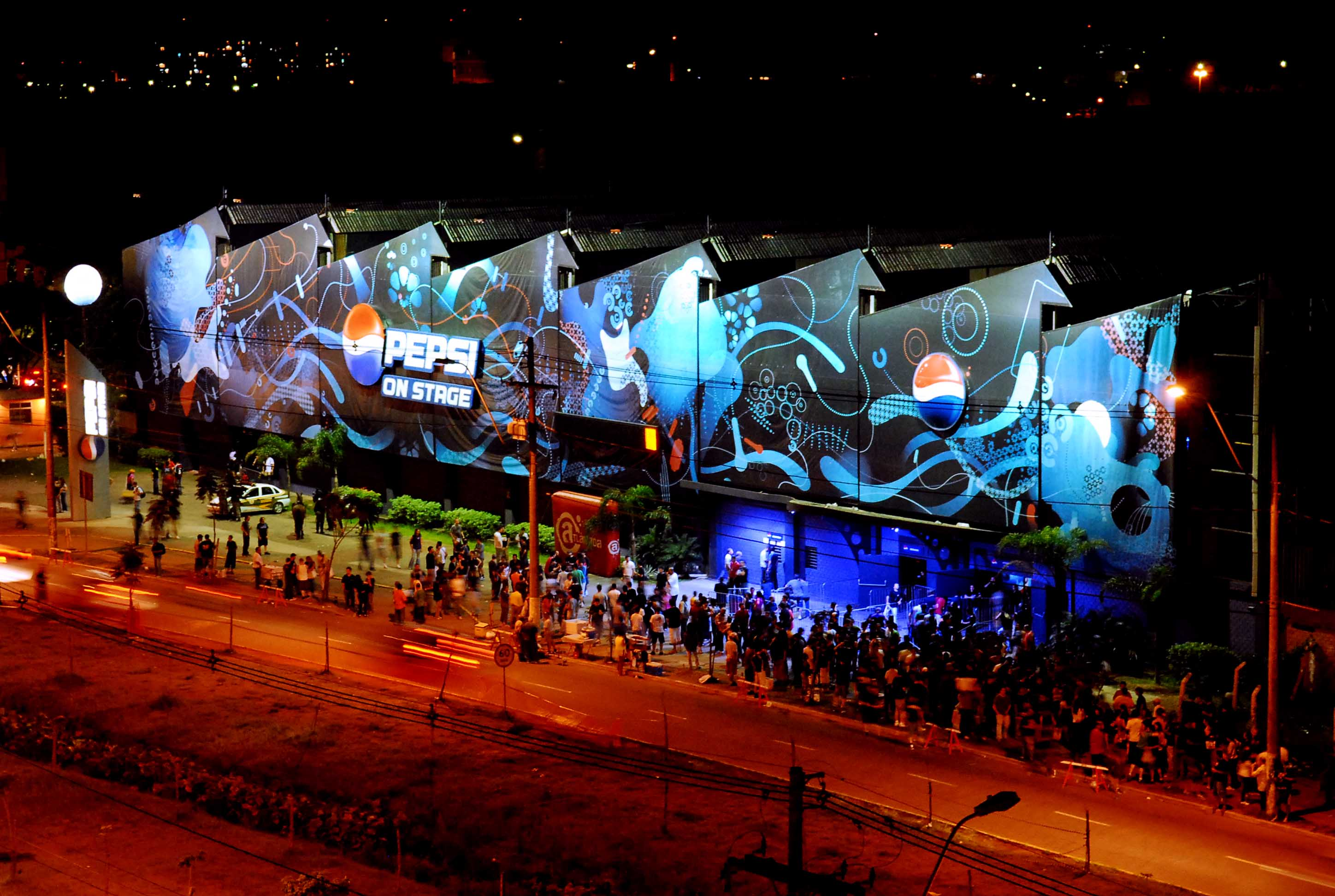 Fotografia da casa de espetáculos Pepsi on Stage, tirada do estacionamento do Aeroporto Internacional Salgado Filho.